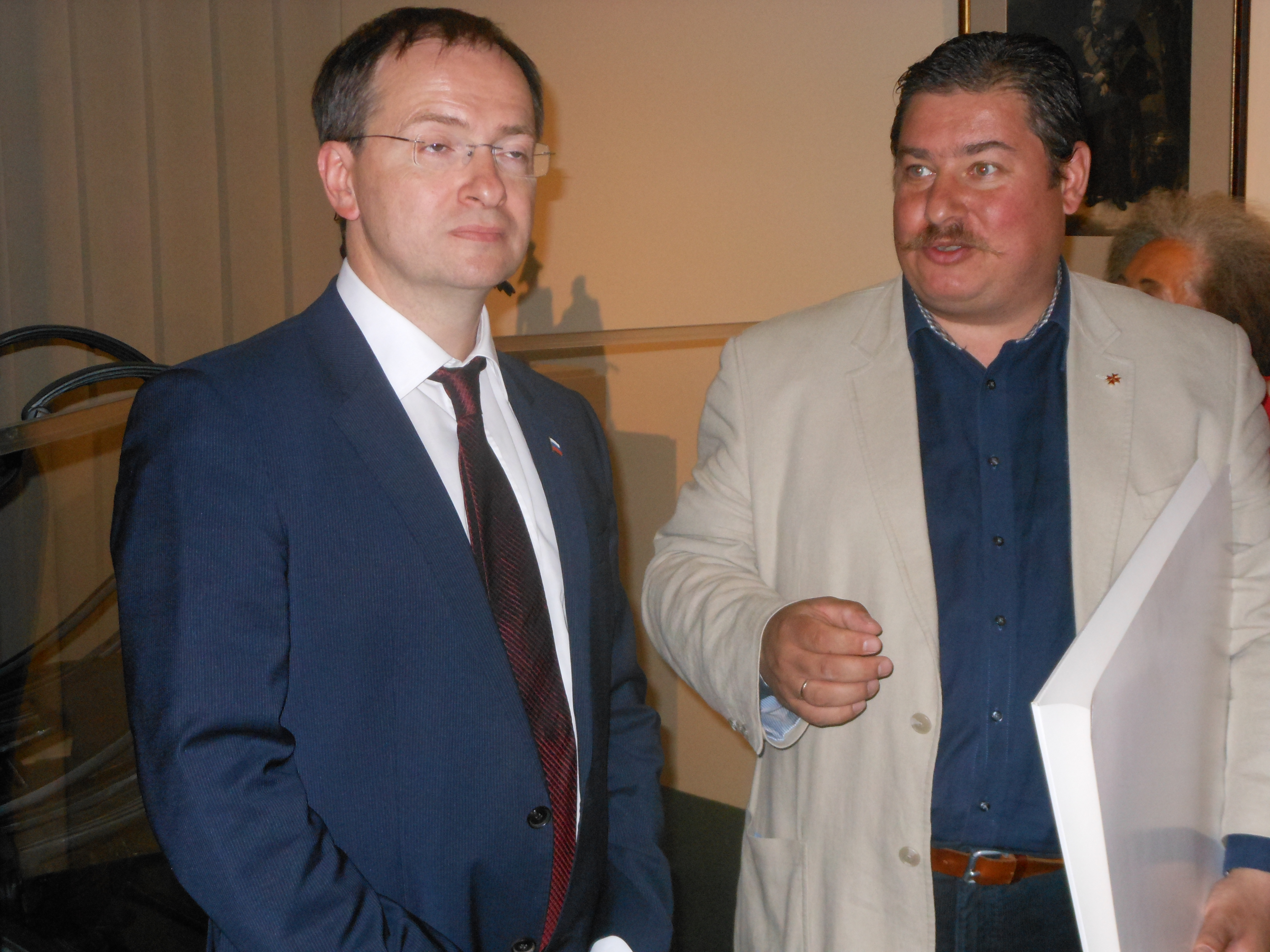 Владимир Мединский и директор Бородинского государственного военно-исторического музея Валерий Климов